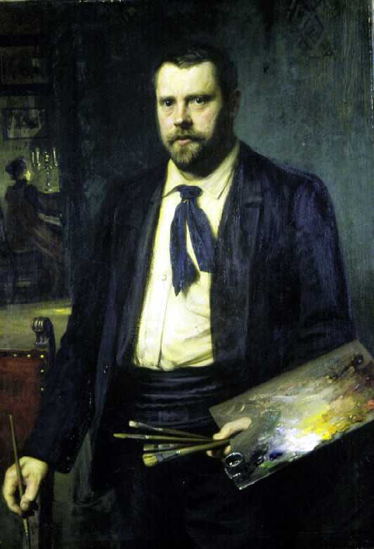 Selvportrett. Portrett i interiør. Stående knebilde 1/8 venstre profil. Hår kortklipt, brunsvart med grått lys. Ansikt svakt rødmusset med gulhvitt lys. Øyne grå. Brun mustasje og spisst helskjegg. Gulhvit skjorte. Blått slips. Gråsvart jakke og do. bukser. Gråsvart skjerf om livet. I venstre hånd holder han palett og pensler og i høyre hånd én pensel. Bakgrunn: Til høyre: grønt mønstret tapet. Til venstre: rødt ryggstøe av stol. Gjennom dør sees fru Smith ved piano med 3-armet lysestake ved siden. Grå vegg med malerier i svarte rammer.